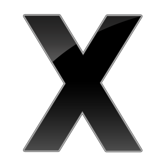 Mac OS X Actual Logo.